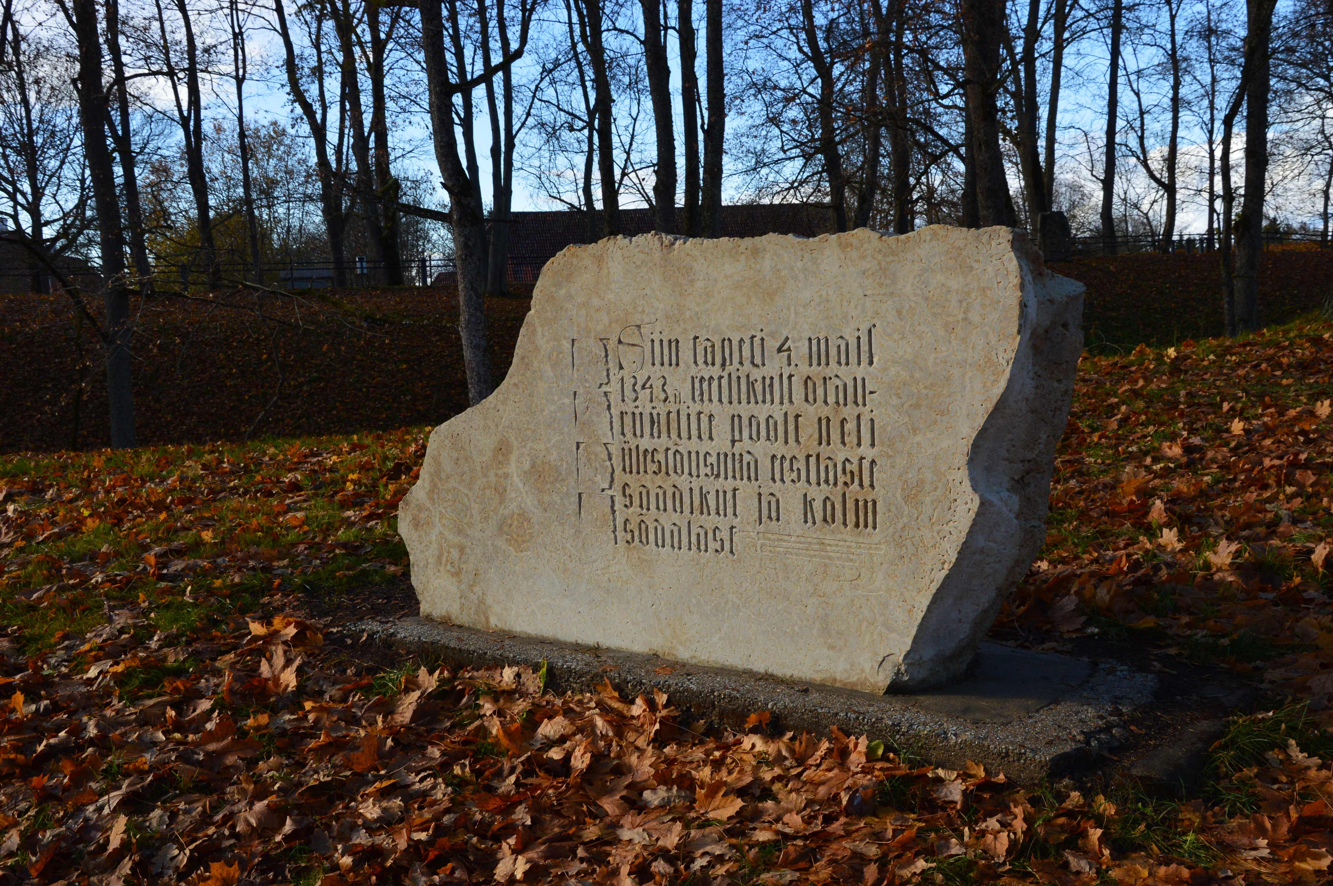 Mälestusmärk neljale kuningale Paide Vallimäel.